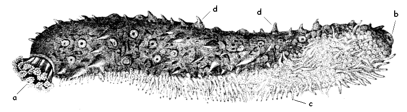 Holothuria tubulosa en: Sea cucumber (a - Tentacles, b - Cloaca, c - Ambulacral feet on the ventral side, d - Papillae on the back) de: Seewalze (a - Tentakel, b - Analöffnung, c - Saugfüße der Bauchseite, d - Papillen auf Rückseite) ja: ナマコ (a - 触手, b - 排出腔, c - 腹部の管足, d - 疣足) ru: Морской огурец (a - щупальца, b - клоака, c - амбулякральные ножки на вентральнай поверхности, d - спиные сосочки) sv: Sjögurka (a - tentakler, b - analöppning, c - sugfötter på buksidan, d - papiller på ryggsidan)